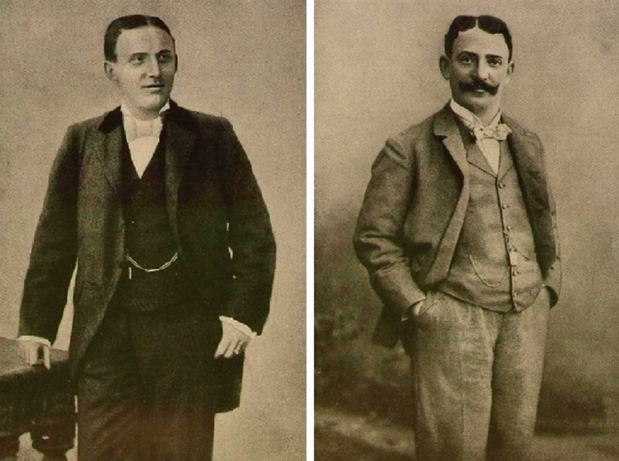 Gebrüder Herrnfeld, Anton Herrnfeld (1866-1929) und Donat Herrnfeld (1867-1916)